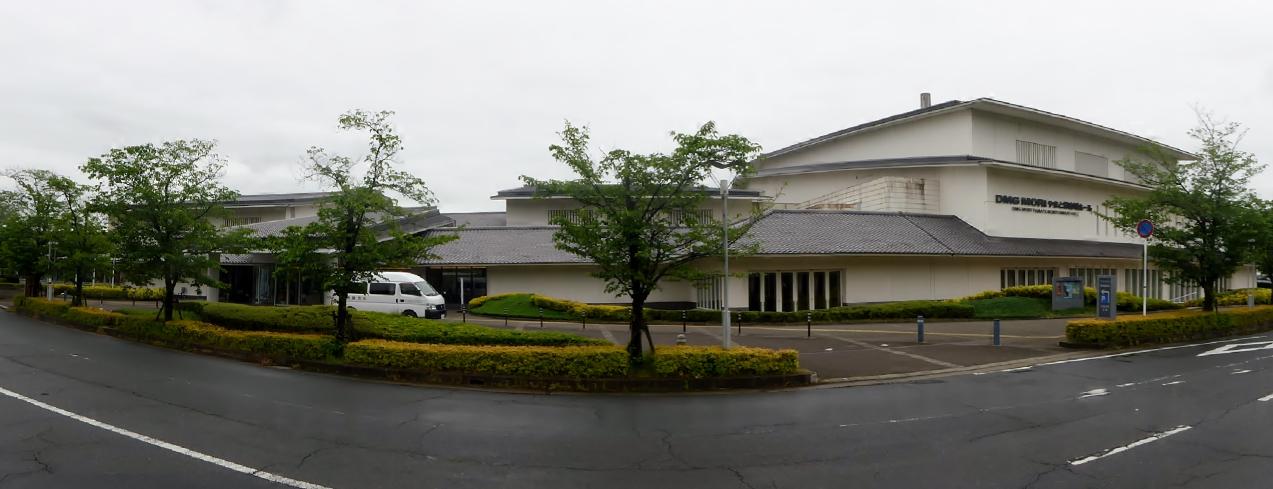 DMG MORIやまと郡山城ホールを撮影。